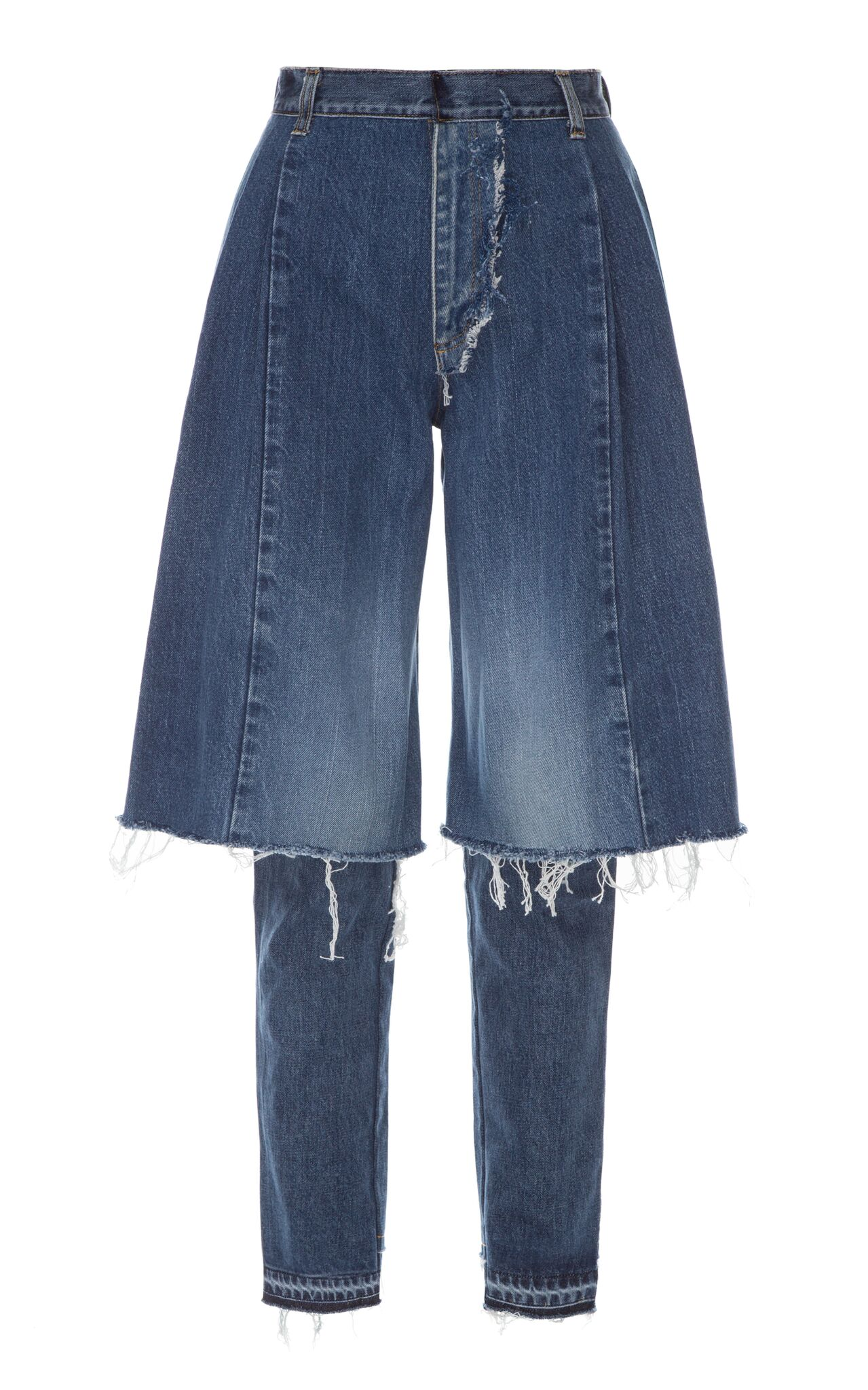 деми-денимс